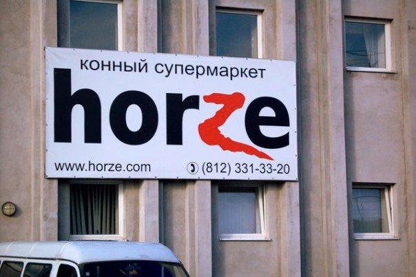 Horze's logo